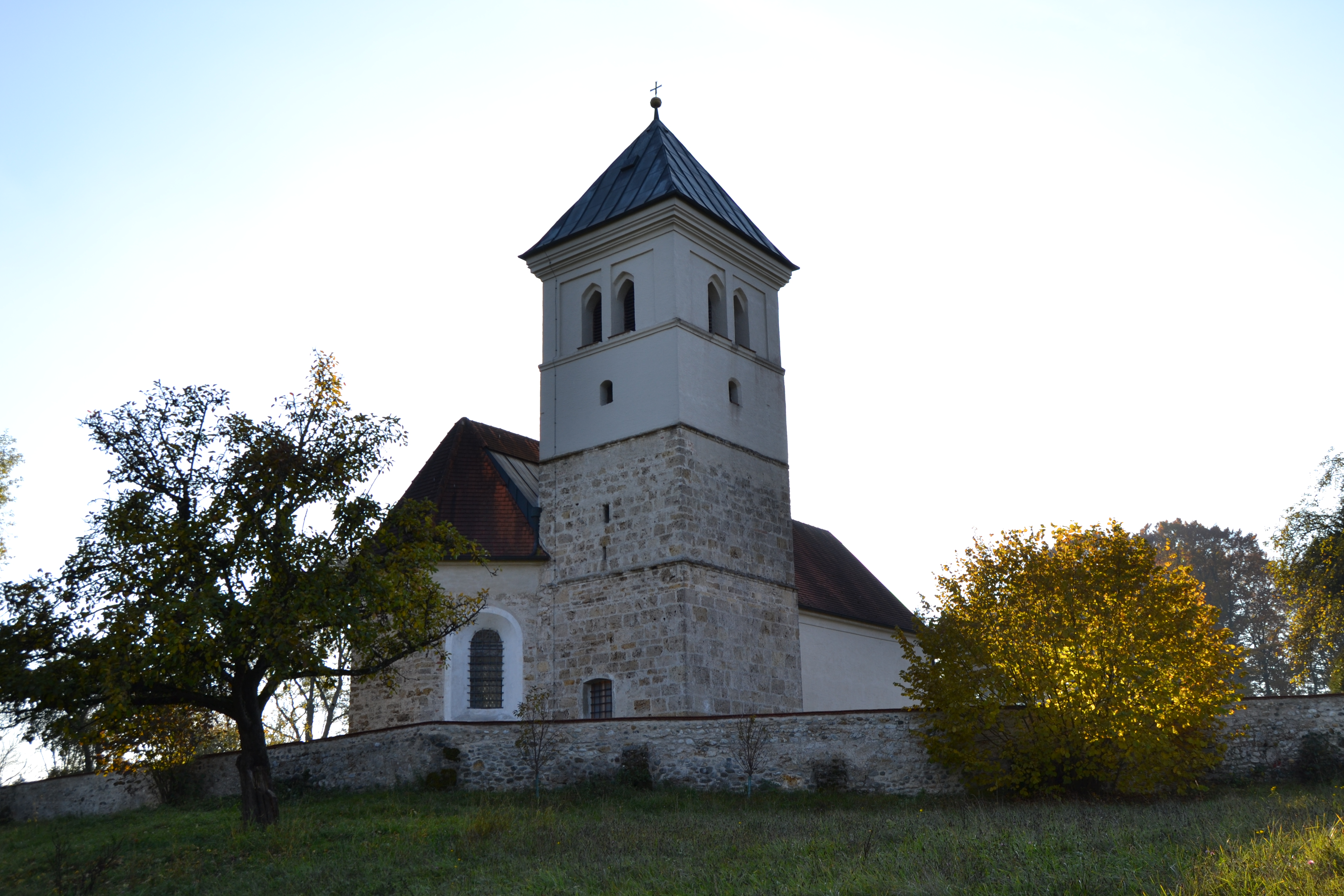 Kirche von Nordosten